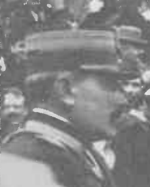 1912 - Colonel Constantin Costescu Sursa - Gazeta Ilustrata 02 nr. 028, 22 iunie 1913 Restricţii - fără restricţii datorită vechimii